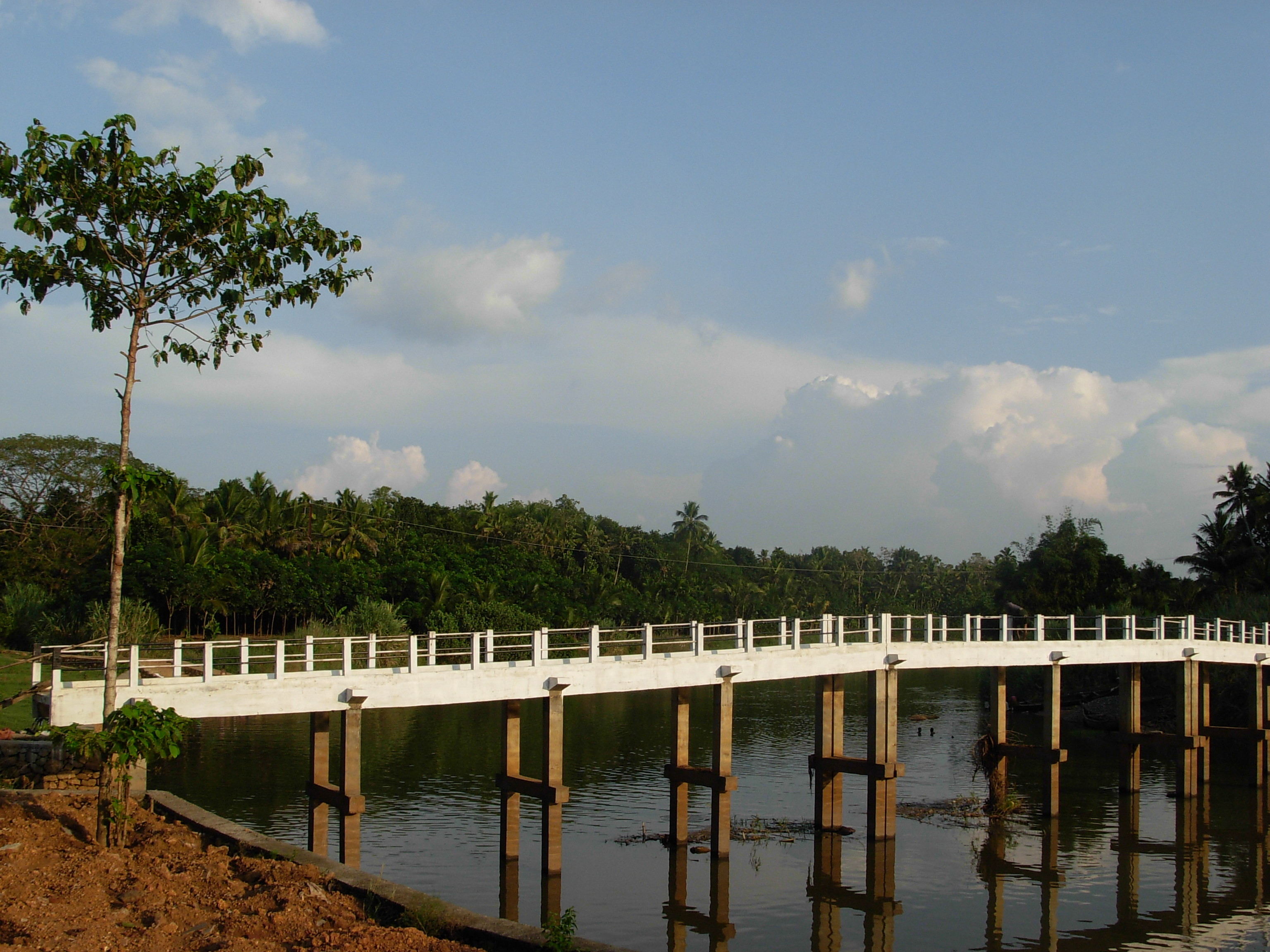 മധ്യ തിരുവിതാംകൂറിലെ പ്രസിധമായ വിഷു ഉൽസവം നടക്കുന്ന വെണ്മണിയിലെ ശാർങക്കാവിൽ അച്ചൻ കോവിലാറിനു കുറുകെയുള്ള നടപ്പാലം.